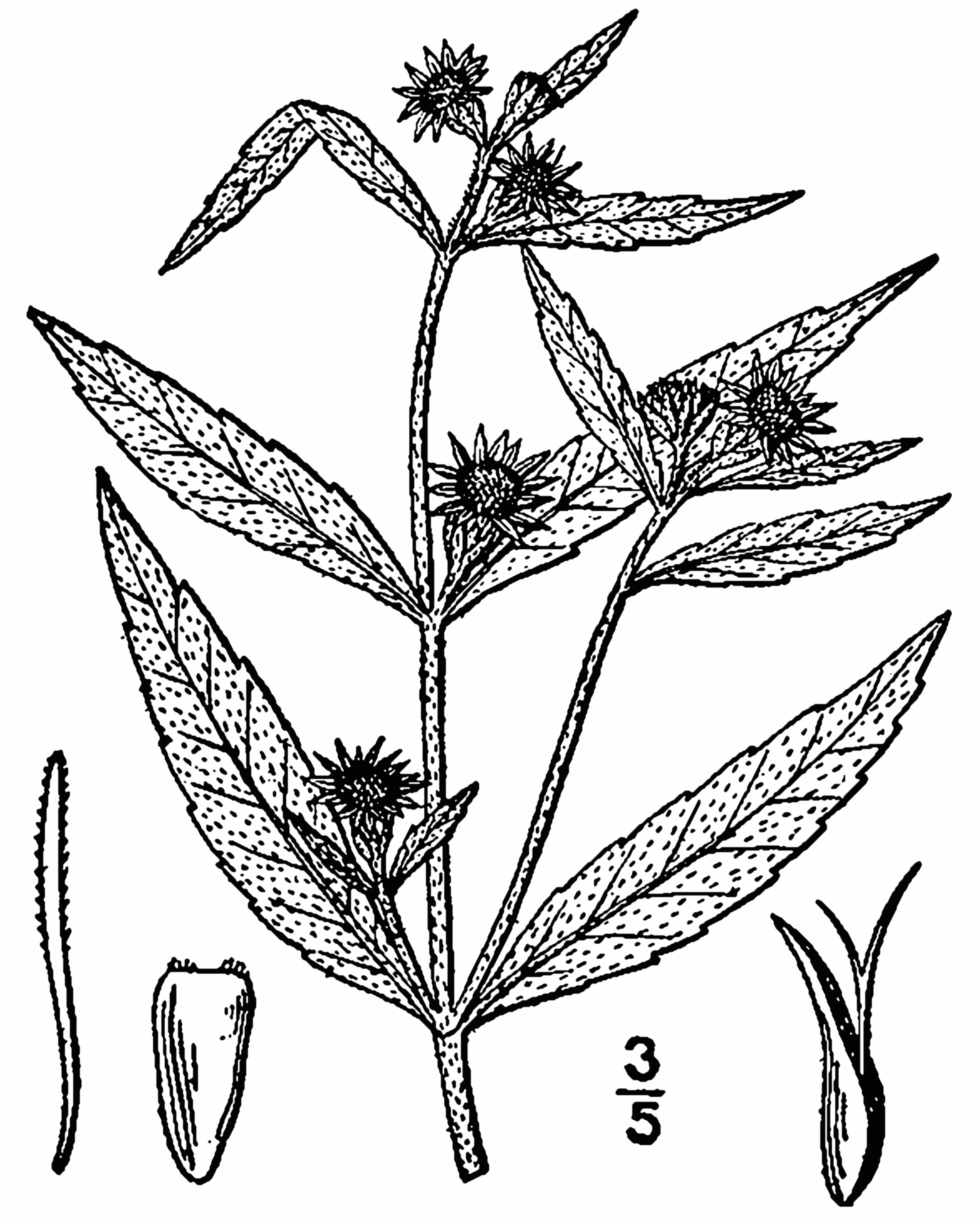 Eclipta prostrata